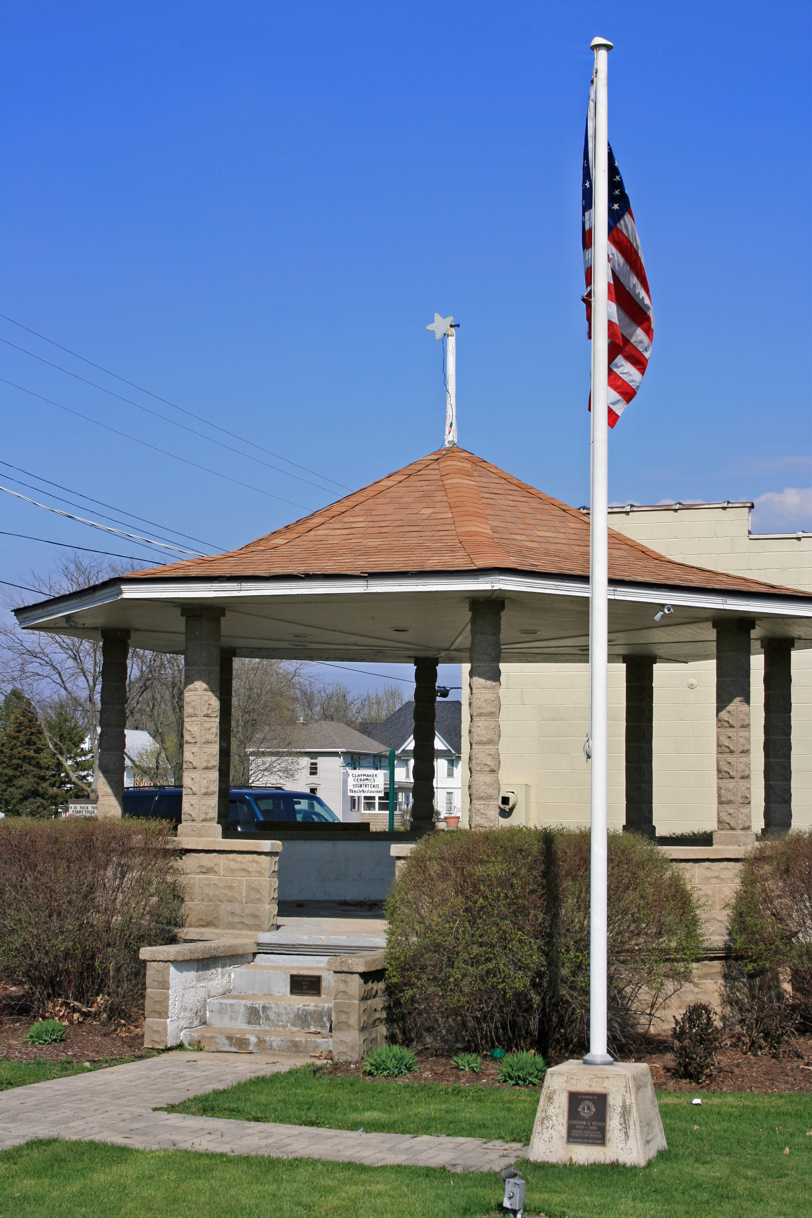 Big Rock, Illinois